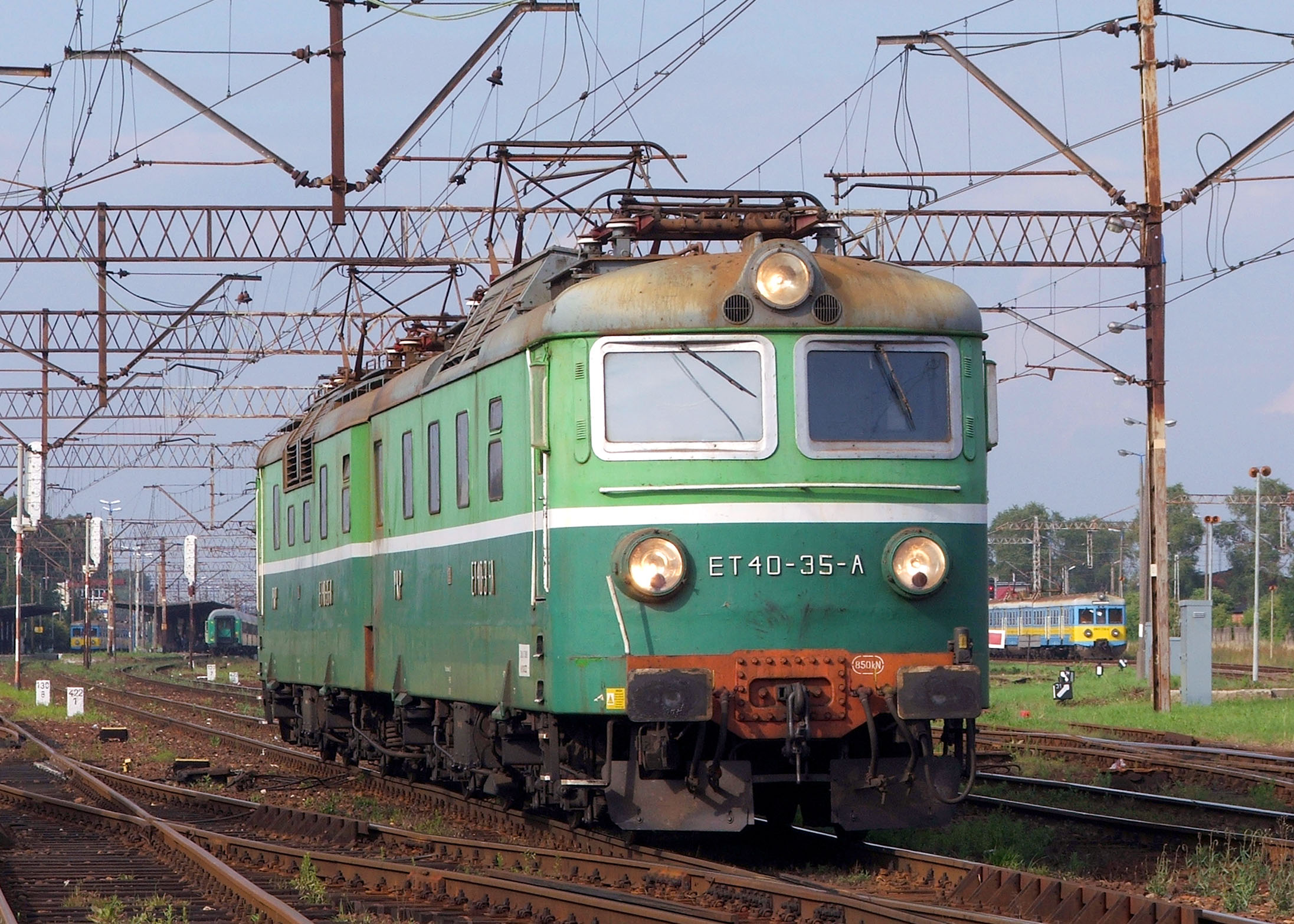 Laskowice Pom. Luzak ET40-35.